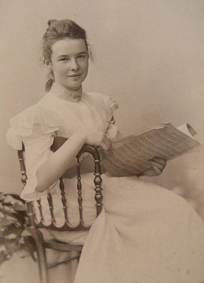 Gisela Lindner, moglie di Robert Michels